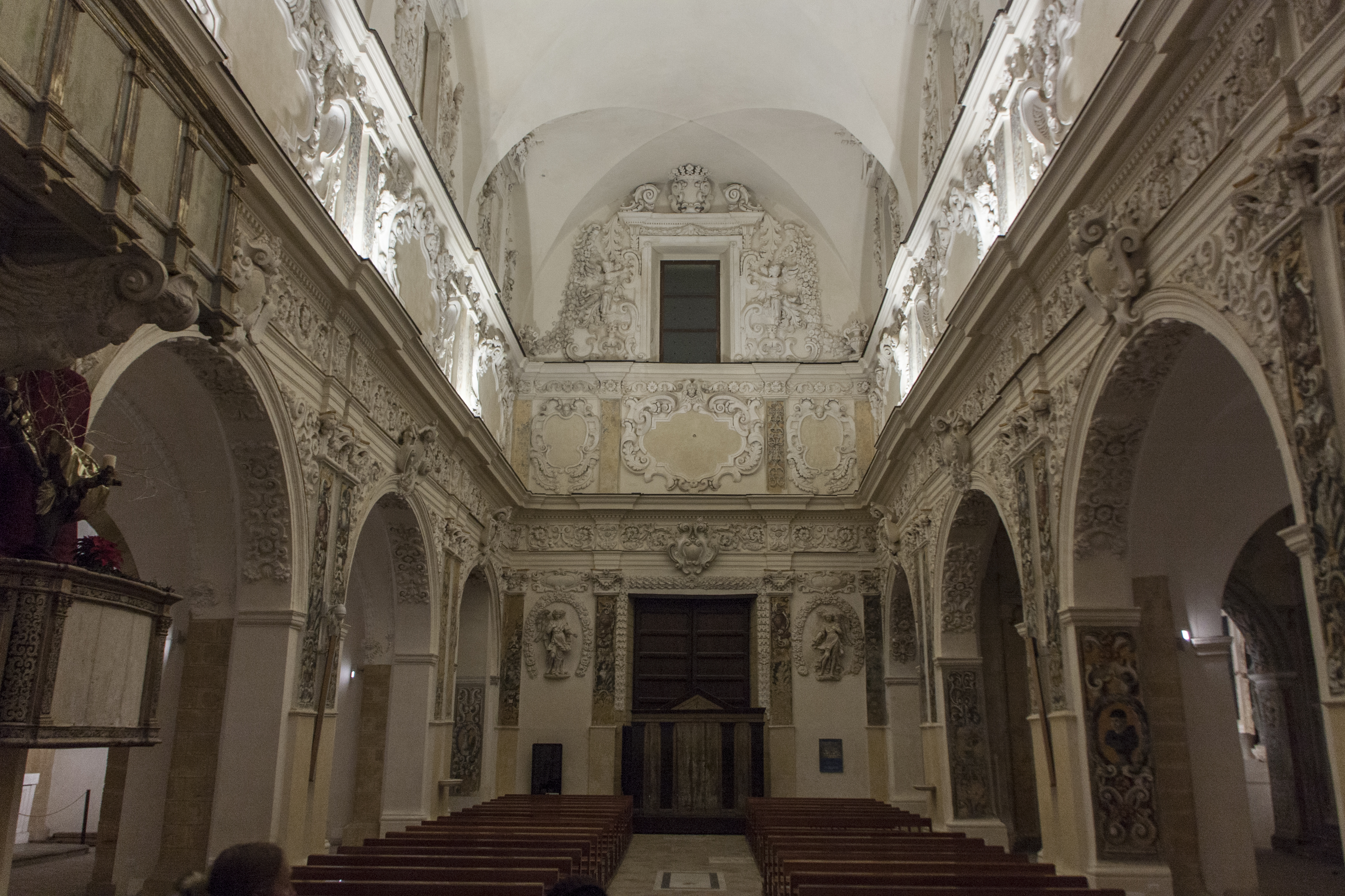 Chiesa di San Domenico (Castelvetrano)